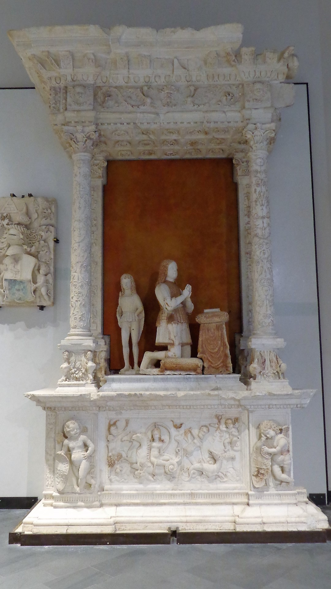 Monumento Balsamo, proveniente dalla chiesa di San Francesco d'Assisi all'Immacolata, oggi custodito nel Museo regionale di Messina